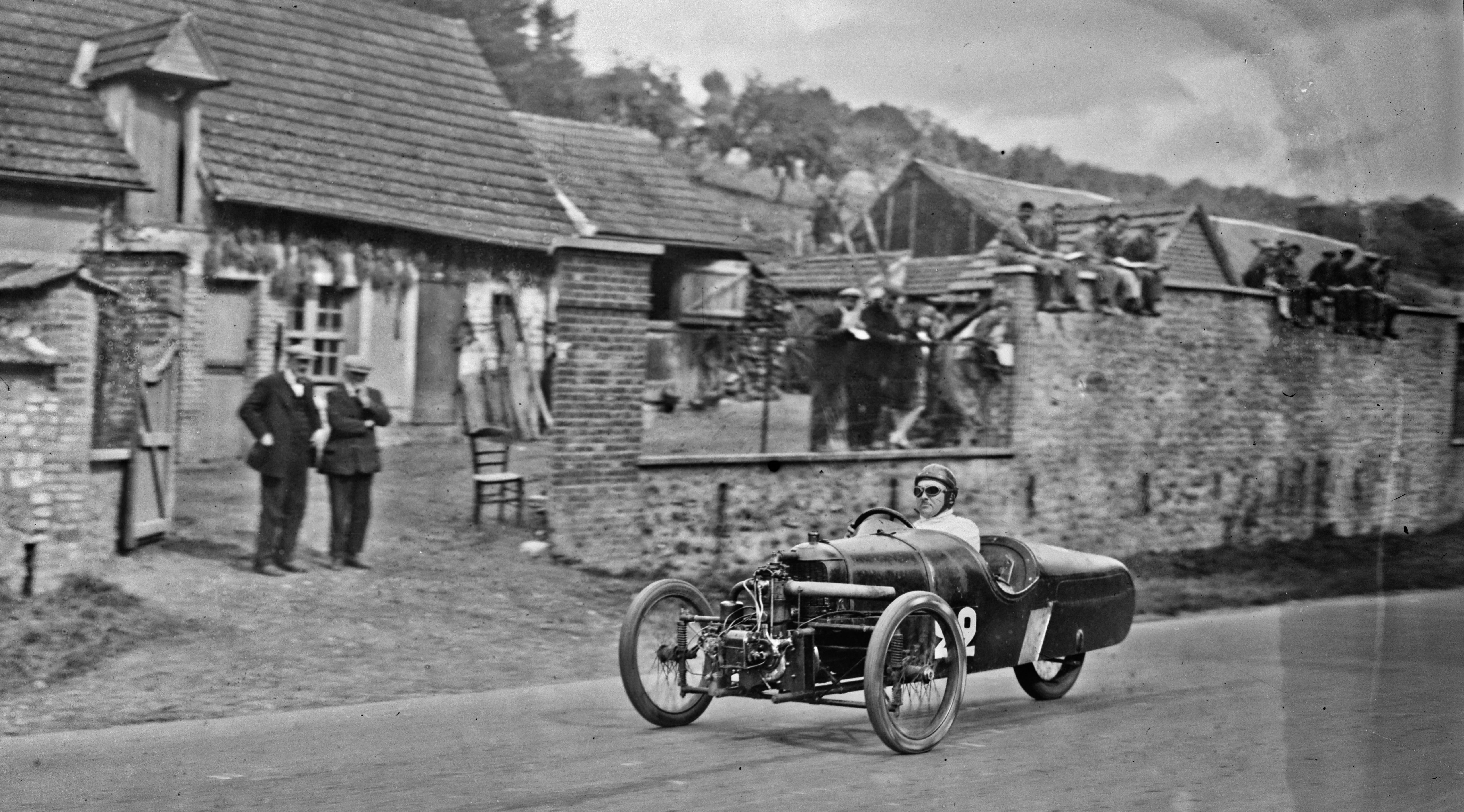 Marcel Dhôme en pleine vitesse